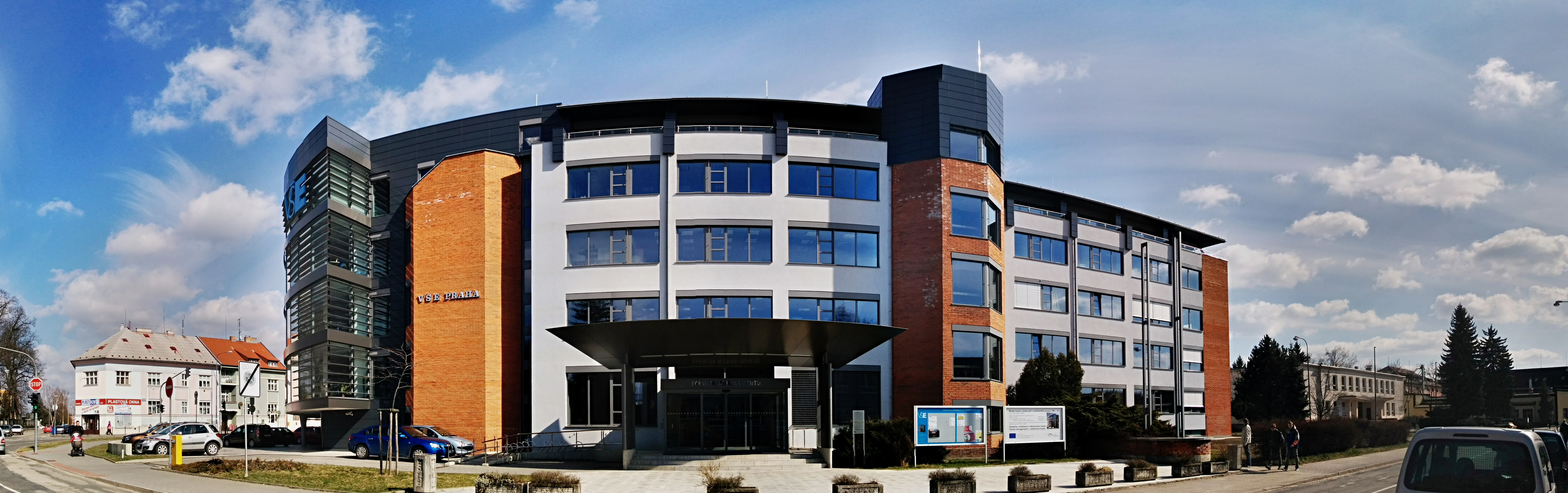 Fakulta managementu Vysoké školy ekonomické